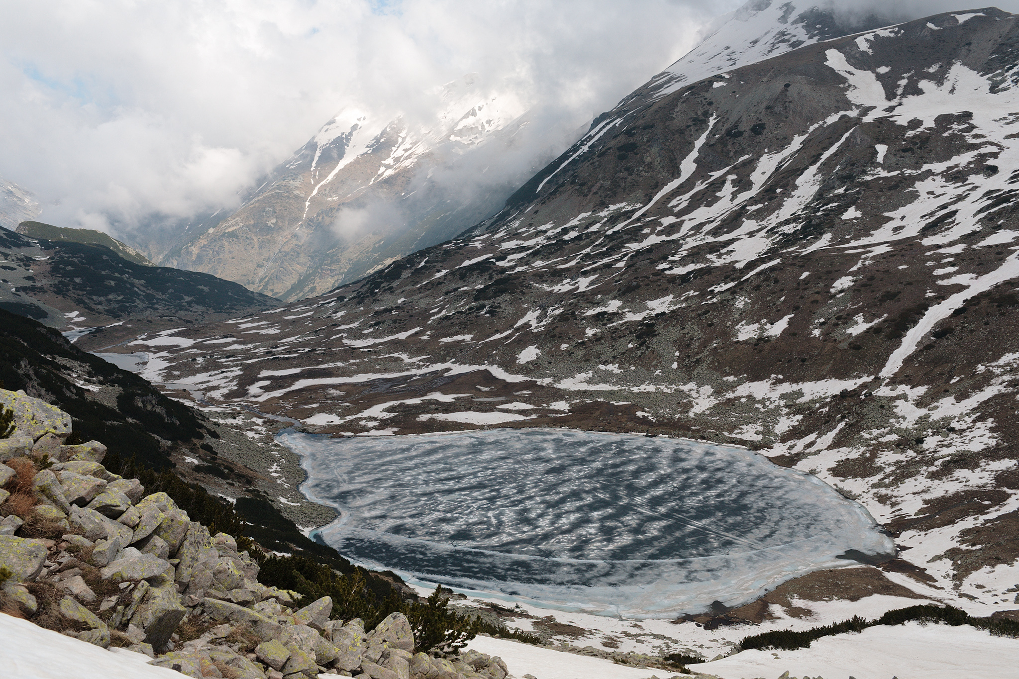 Пирин, Пирин